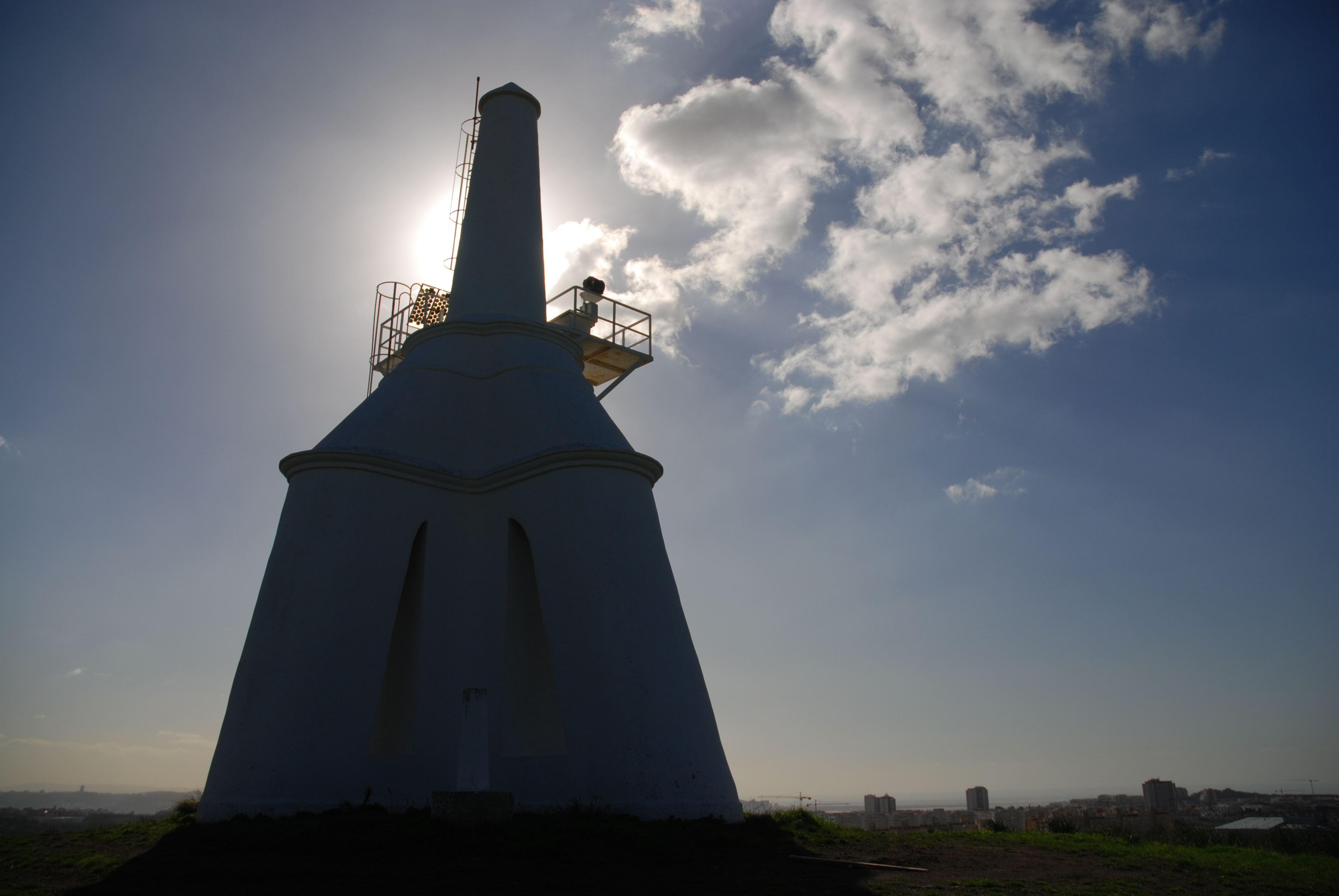 Vértice Geodésico Mama Sul